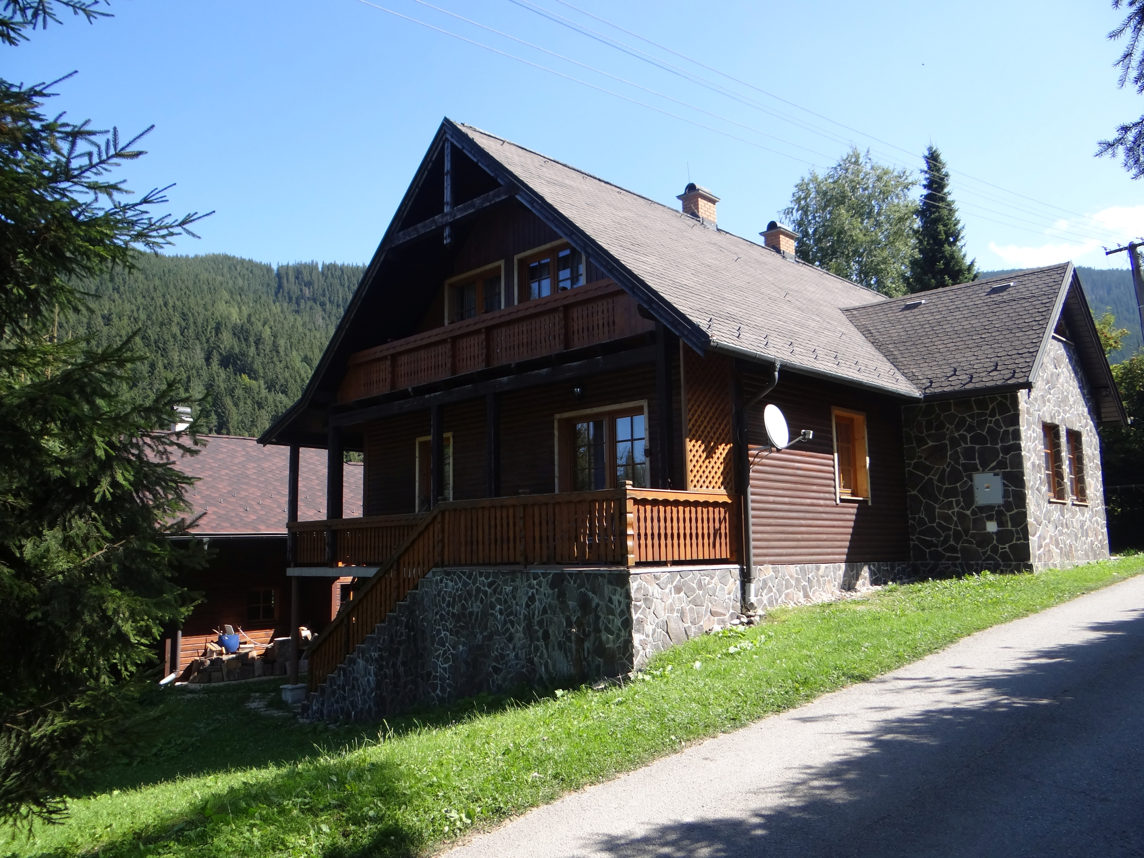 Osada Magurka w Niżnych Tatrach (w Dolinie Lupczańskiej)